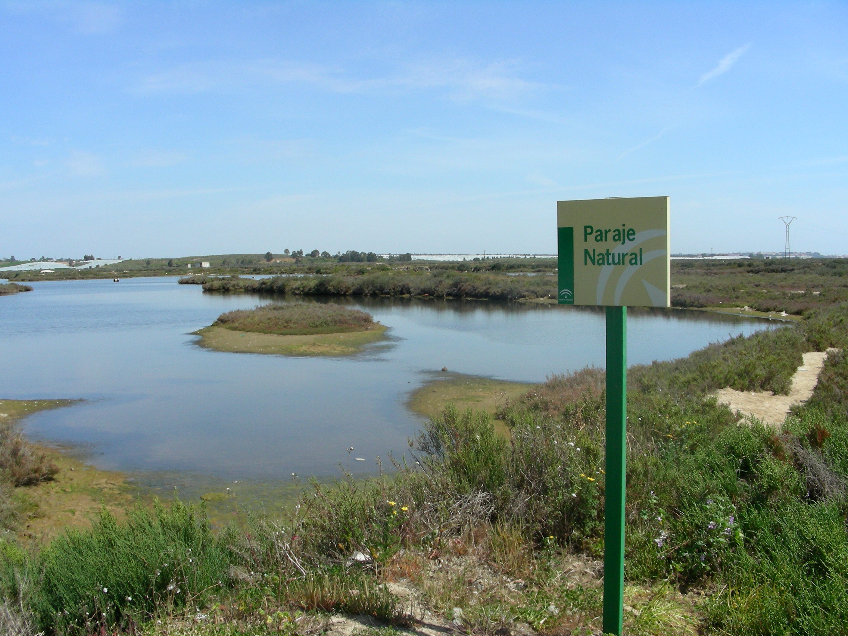 Paraje Natural marismas de Isla Cristina